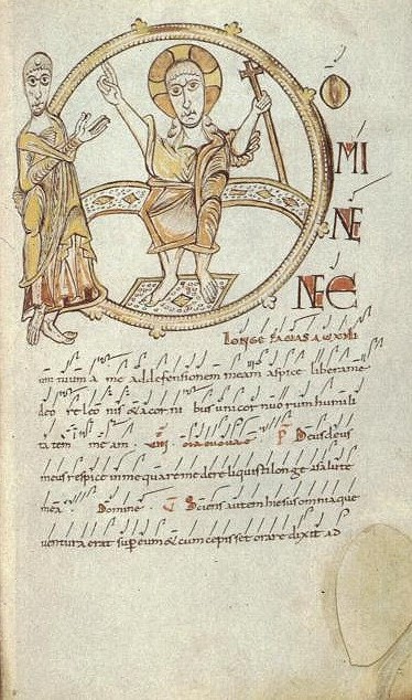 Trascrizione di un canto gregoriano. Notazione adiastematica del Codice Angelica.